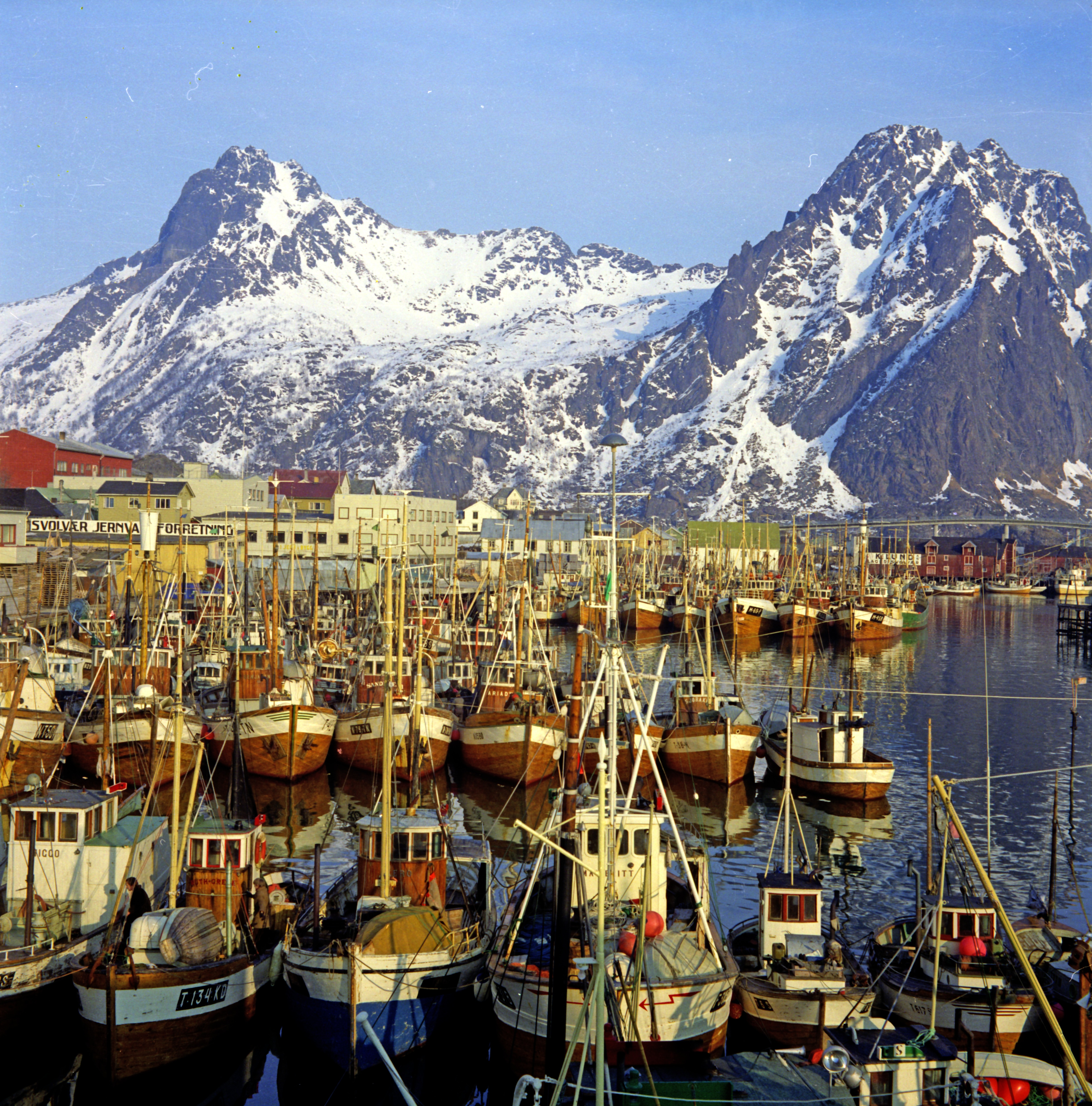 Bildet er hentet fra Nordlandsmuseet bildesamling etter Kanstad. Motivbeskrivelse: Svolvær havn; båter Sted: Vågan, Svolvær, Havna Nøkkelord: Topografi og geologi Båter og fartøyer Motorbåter